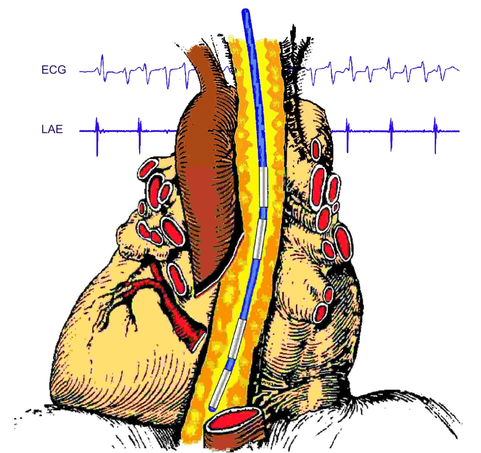 Simultane transösophageale elektrokardiographische Ableitung des linken Vorhofes und der linken Herzkammer